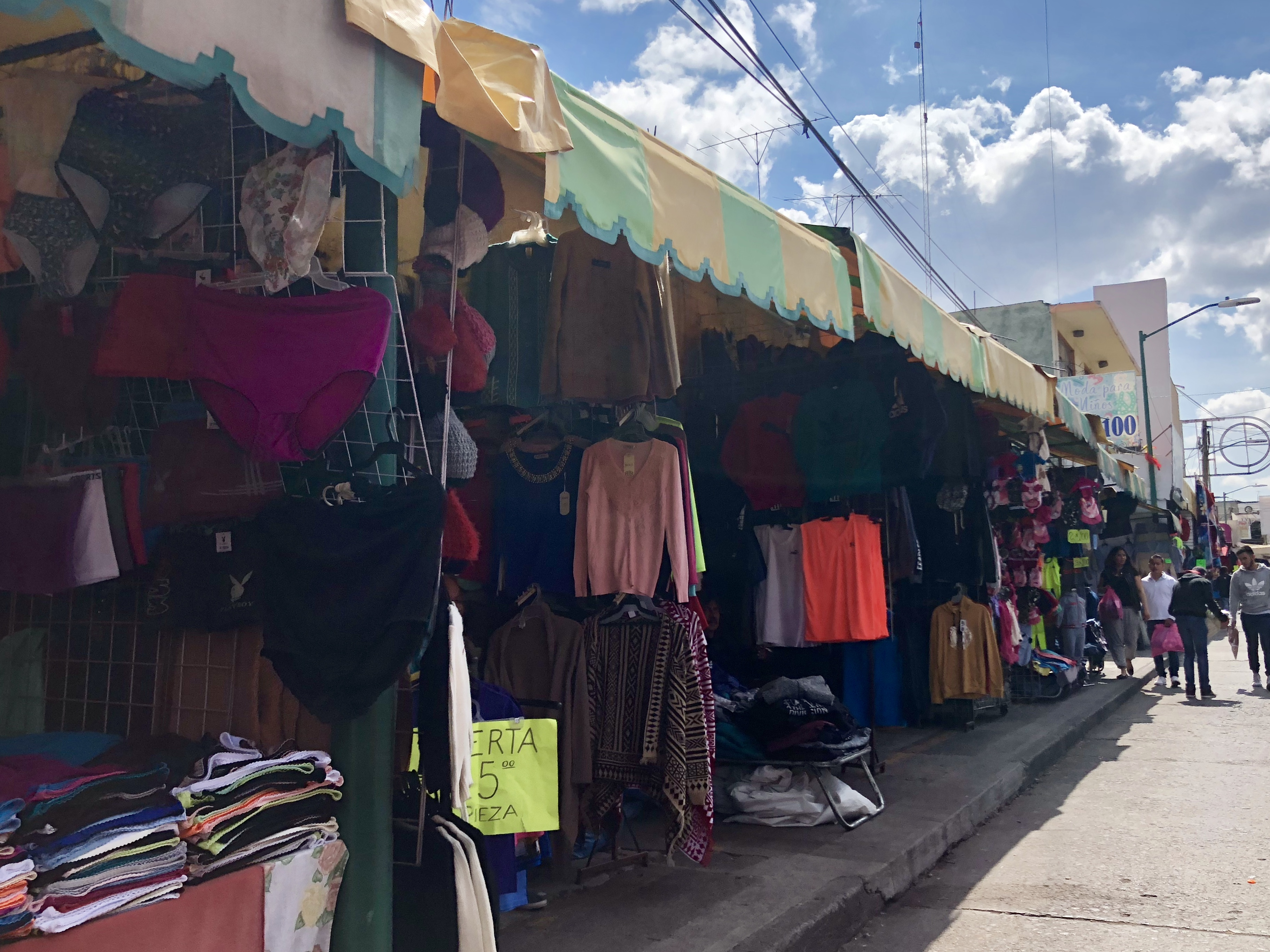 Zona Comercial Textil Uriangato en la Av. Álvaro Obregón, imagen que muestra los puestos de ropa de Uriangato.